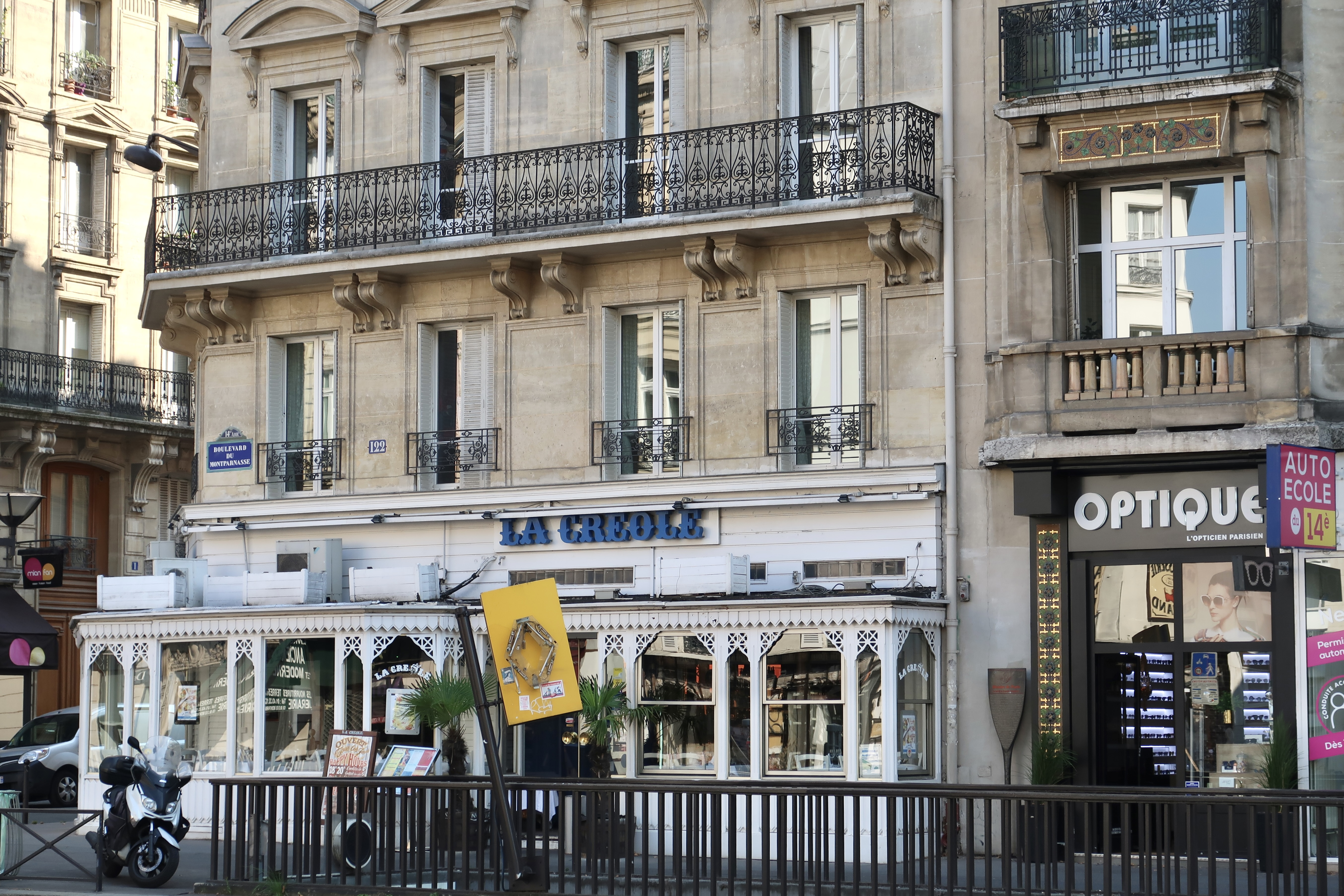 Panneau Histoire de Paris au sujet du bal de la Grande chaumière, 120 boulevard du Montparnasse.